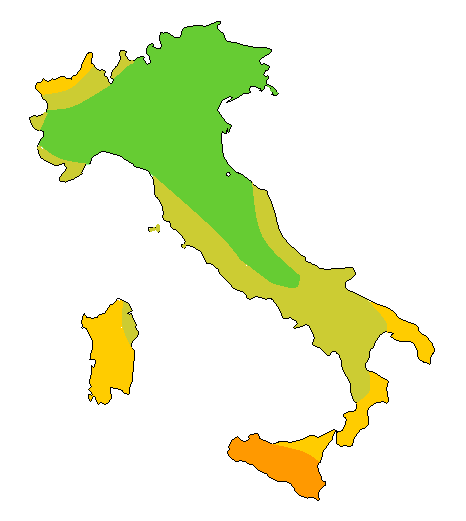 Carta della radiazione solare globale in Italia in settembre 20 MJ/mq